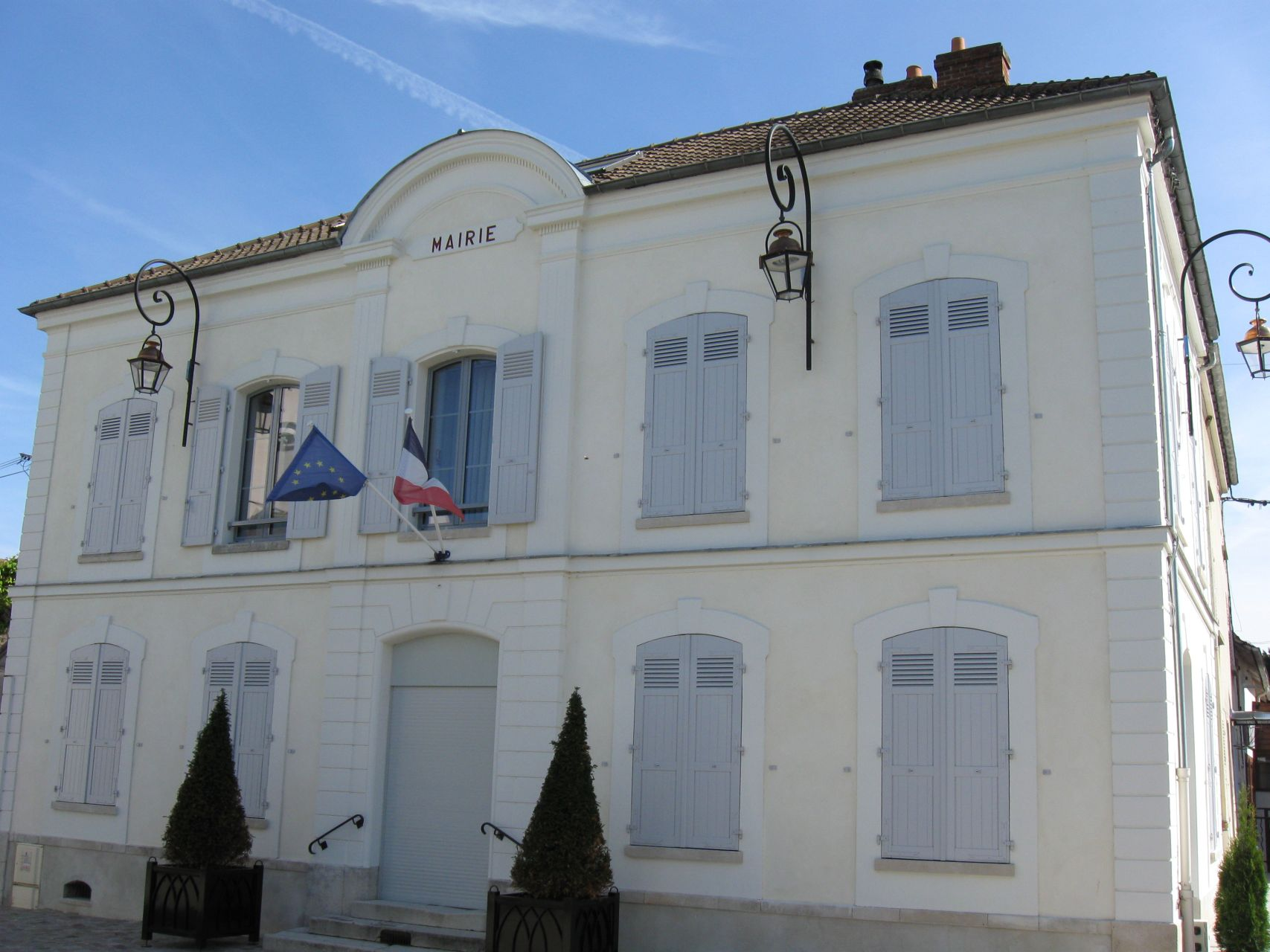 La mairie-école de Saâcy-sur-Marne (Seine-et-Marne, région Île-de-France)